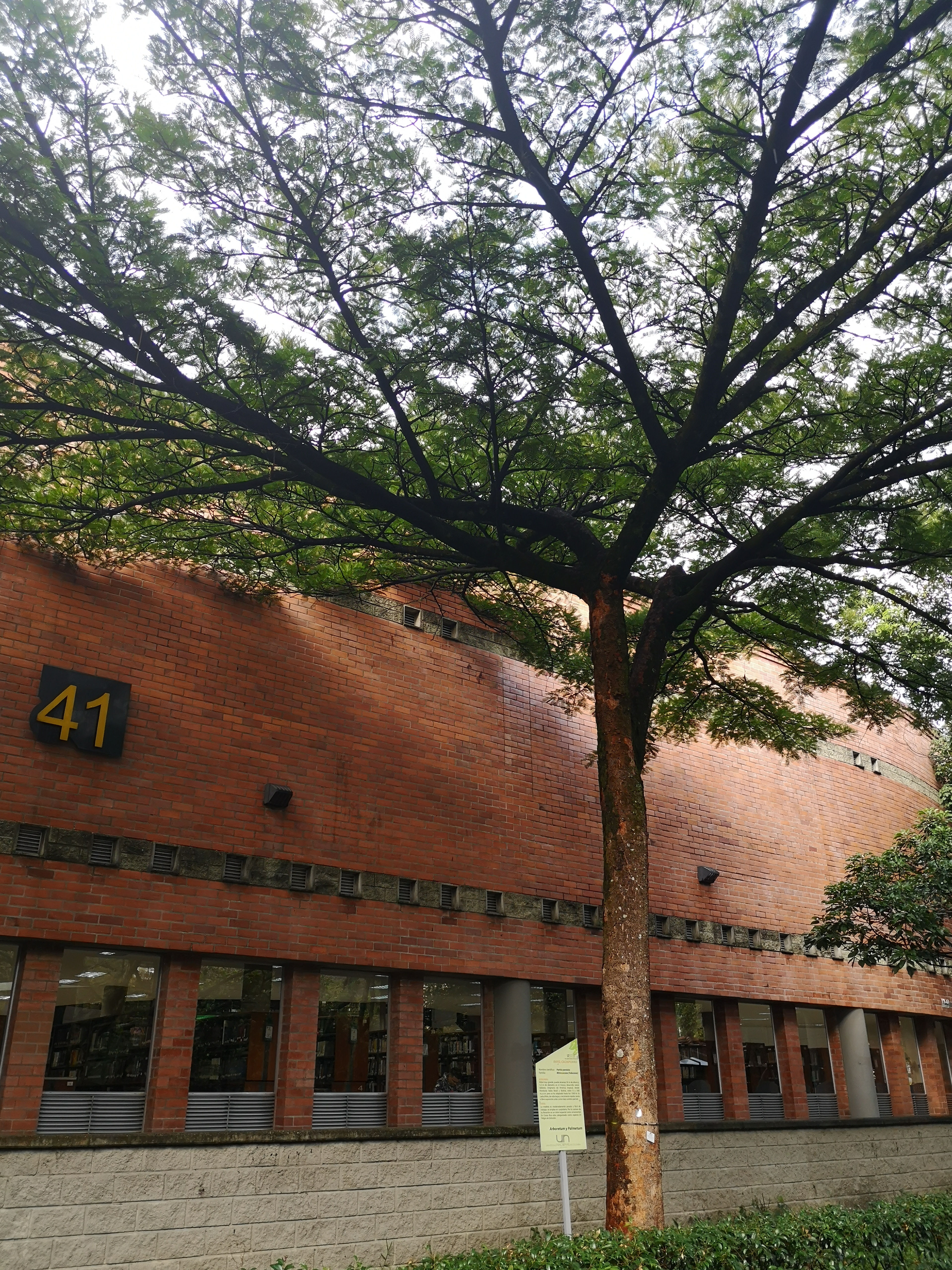 Ejemplar de P. pendula junto a la biblioteca Efe Gómez, Unalmed